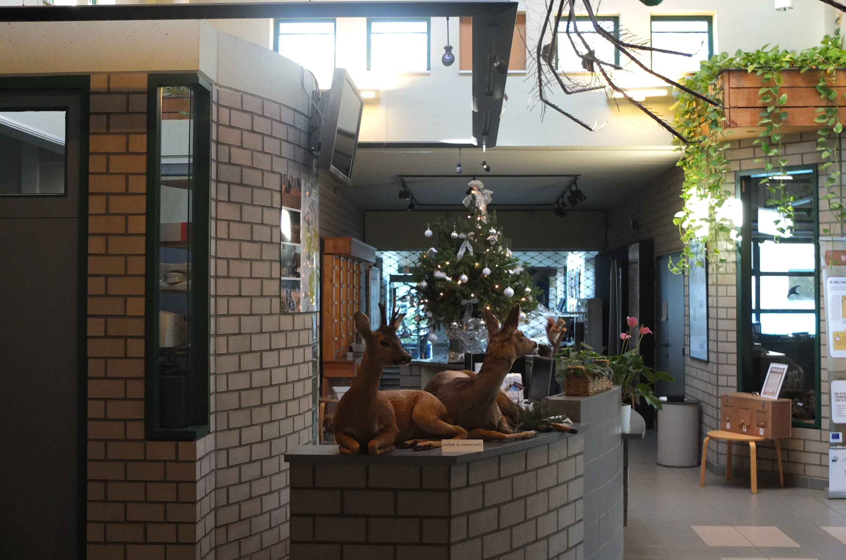 吴语: Infocentrum de Vroente